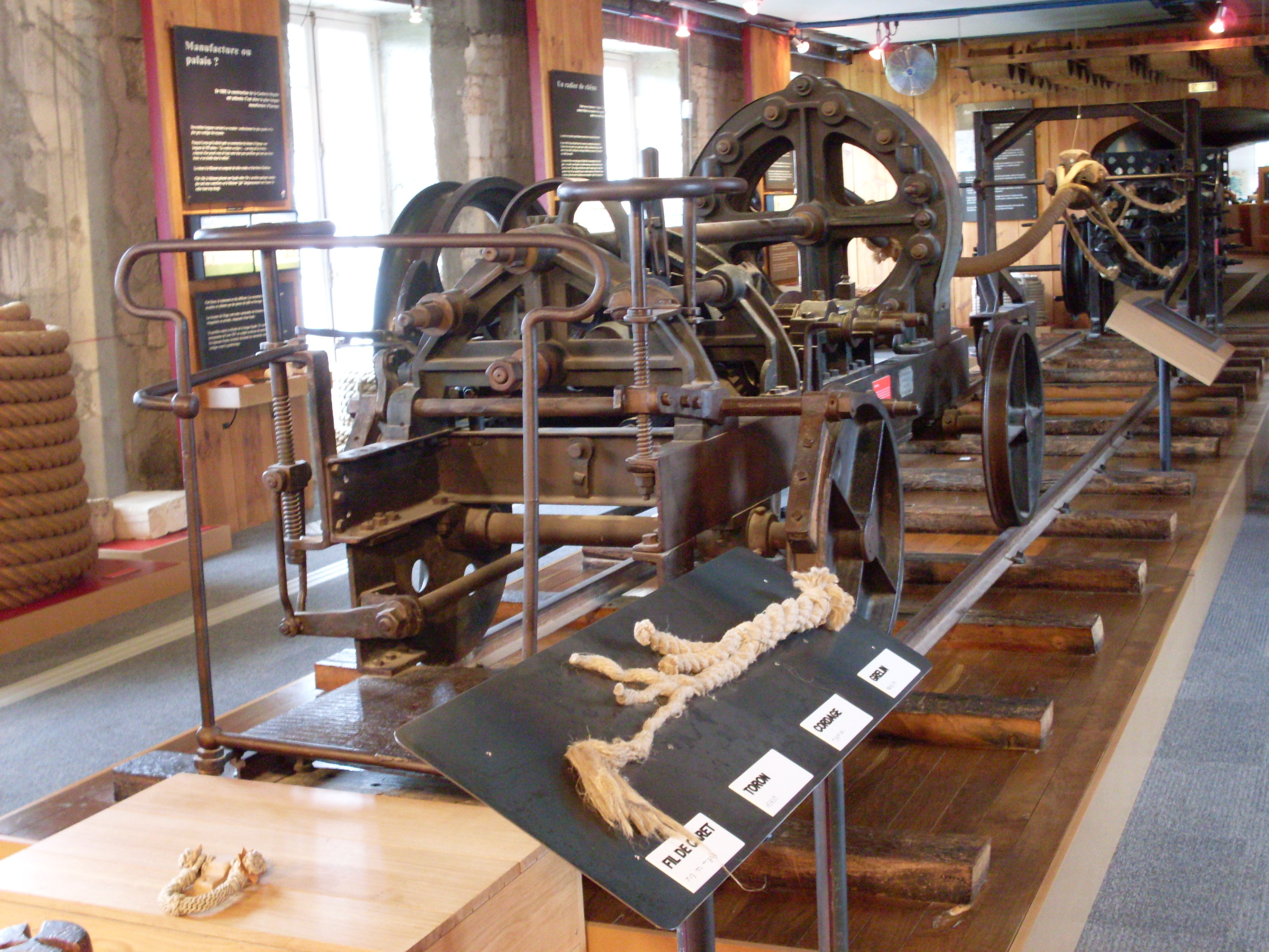 Corderie royale, Rochefort, Charente-Maritime. Fabricant de la machine: Malfliet Hutsebaut, Hamme-Lez, Termonde, Belgique